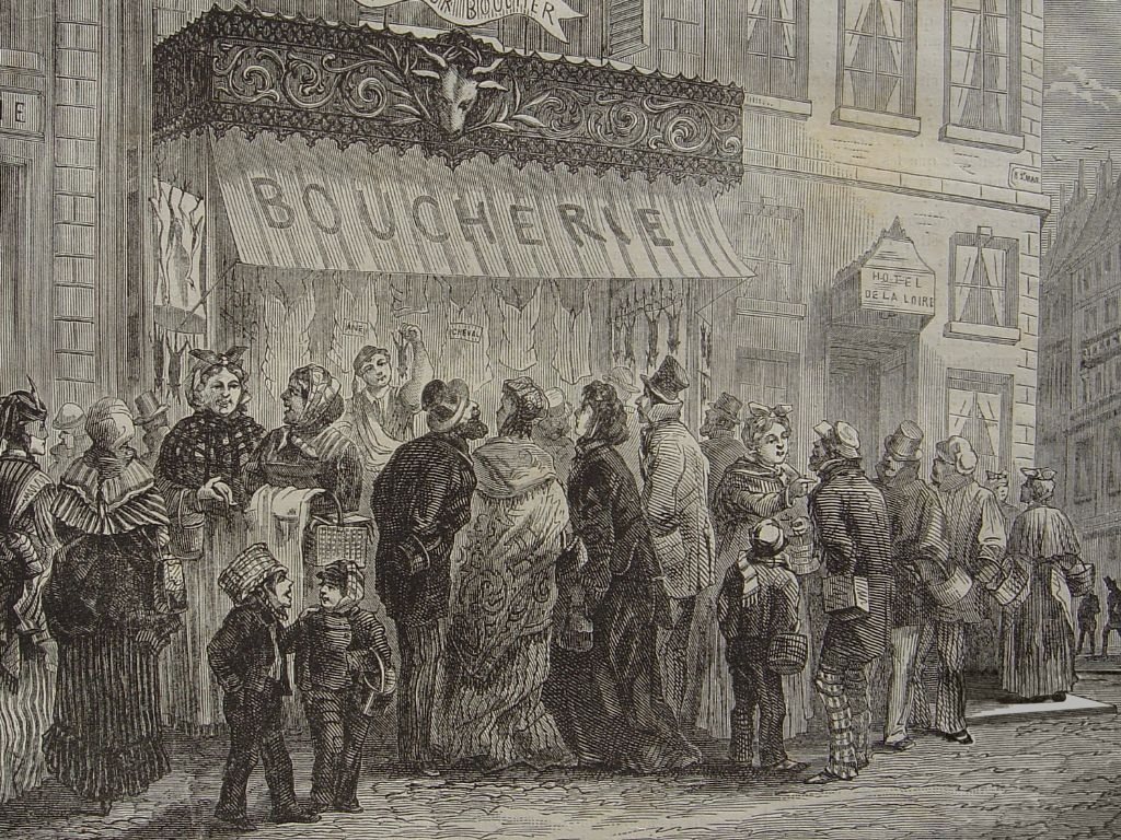 Les ménagères de Paris chez le boucher.